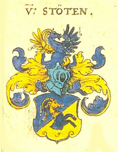 Stammwappen der Augsburger Patrizierfamilie Stetten